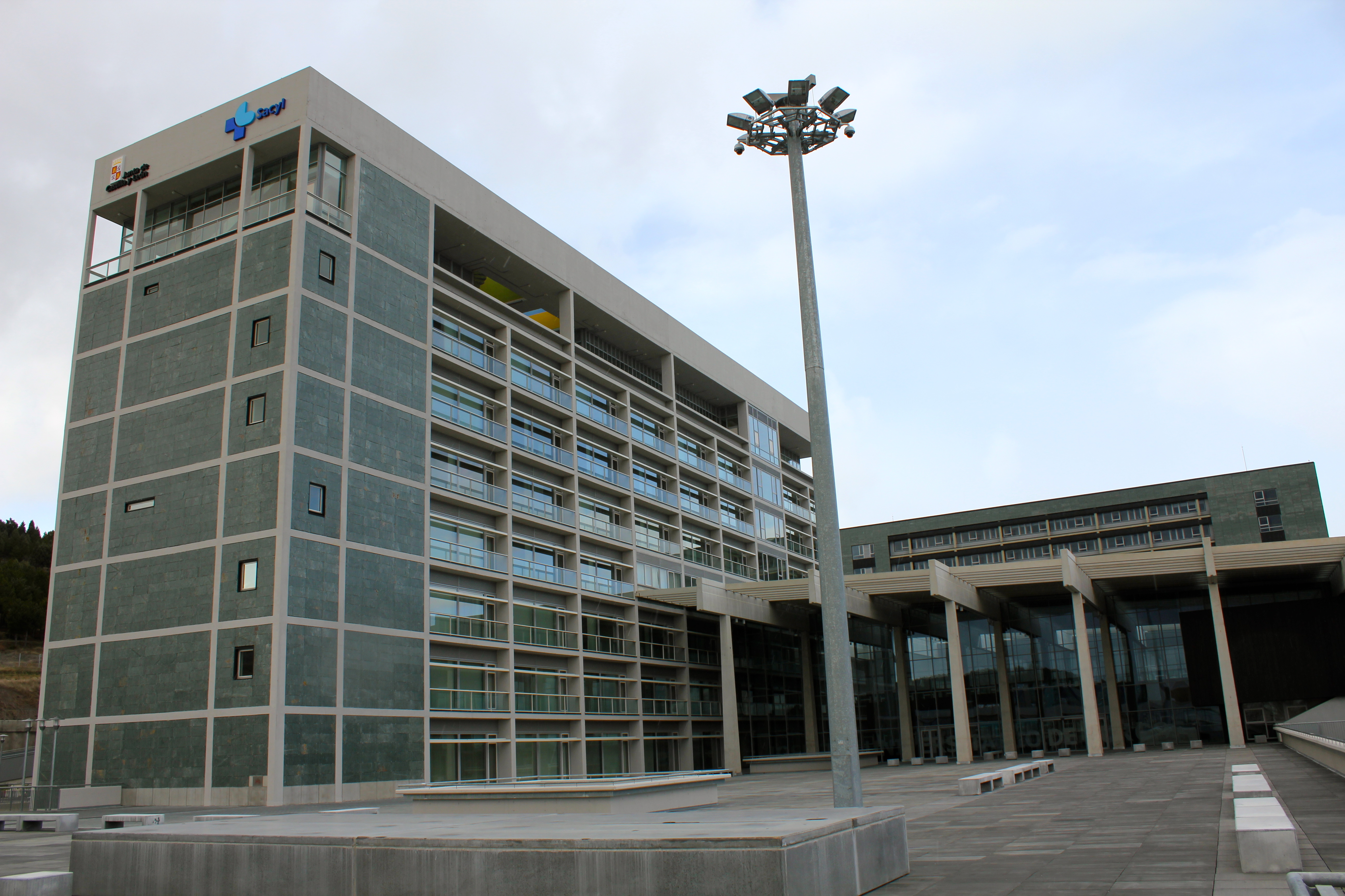 El nuevo hospital de Burgos